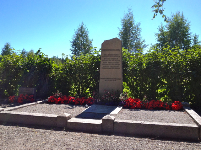 Gudmundrå kyrka i Kramfors: Begravningsplats för fyra av dödsoffren vid Ådalshändelserna 1931.